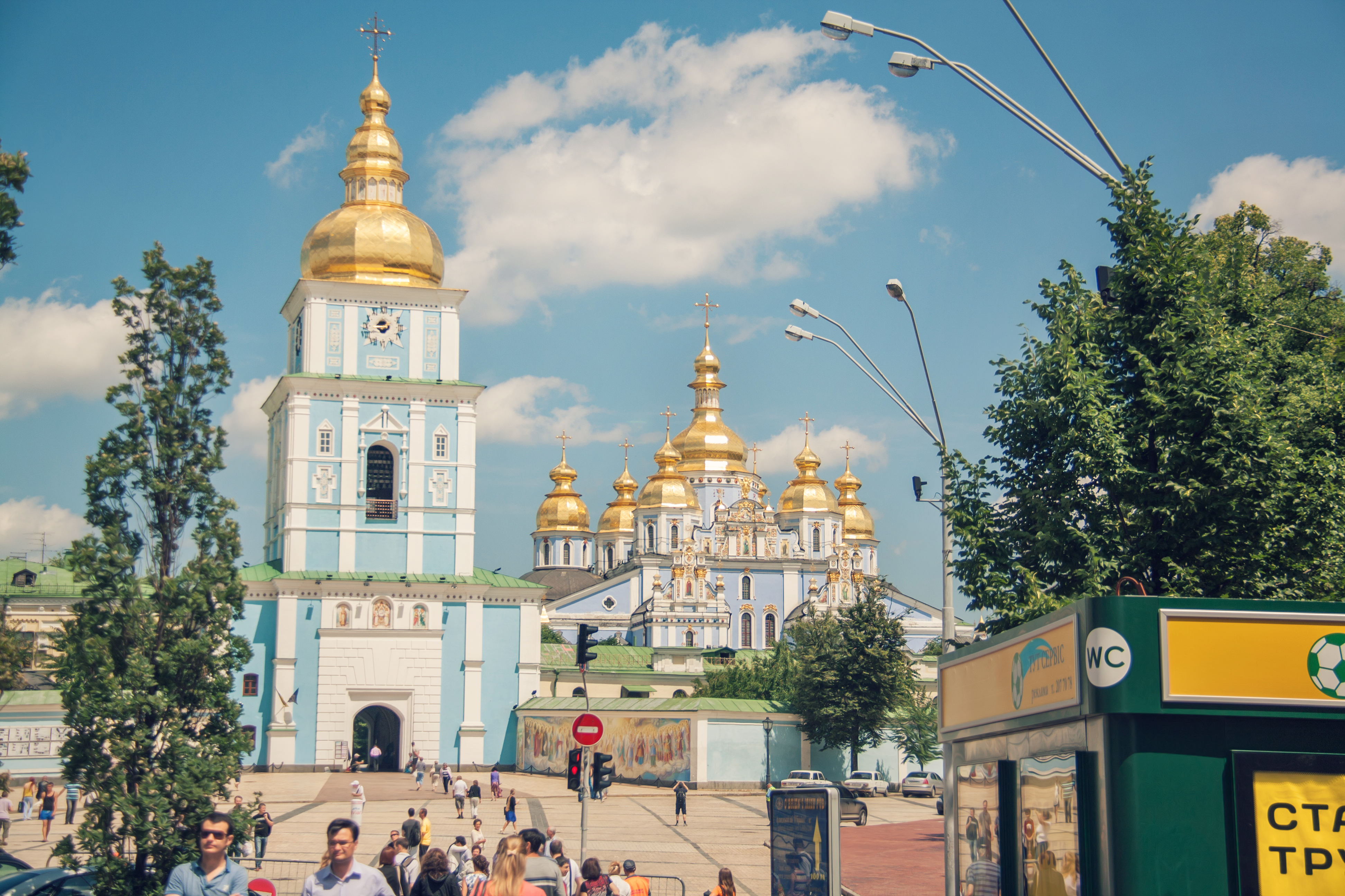 Kiev, Ucrania